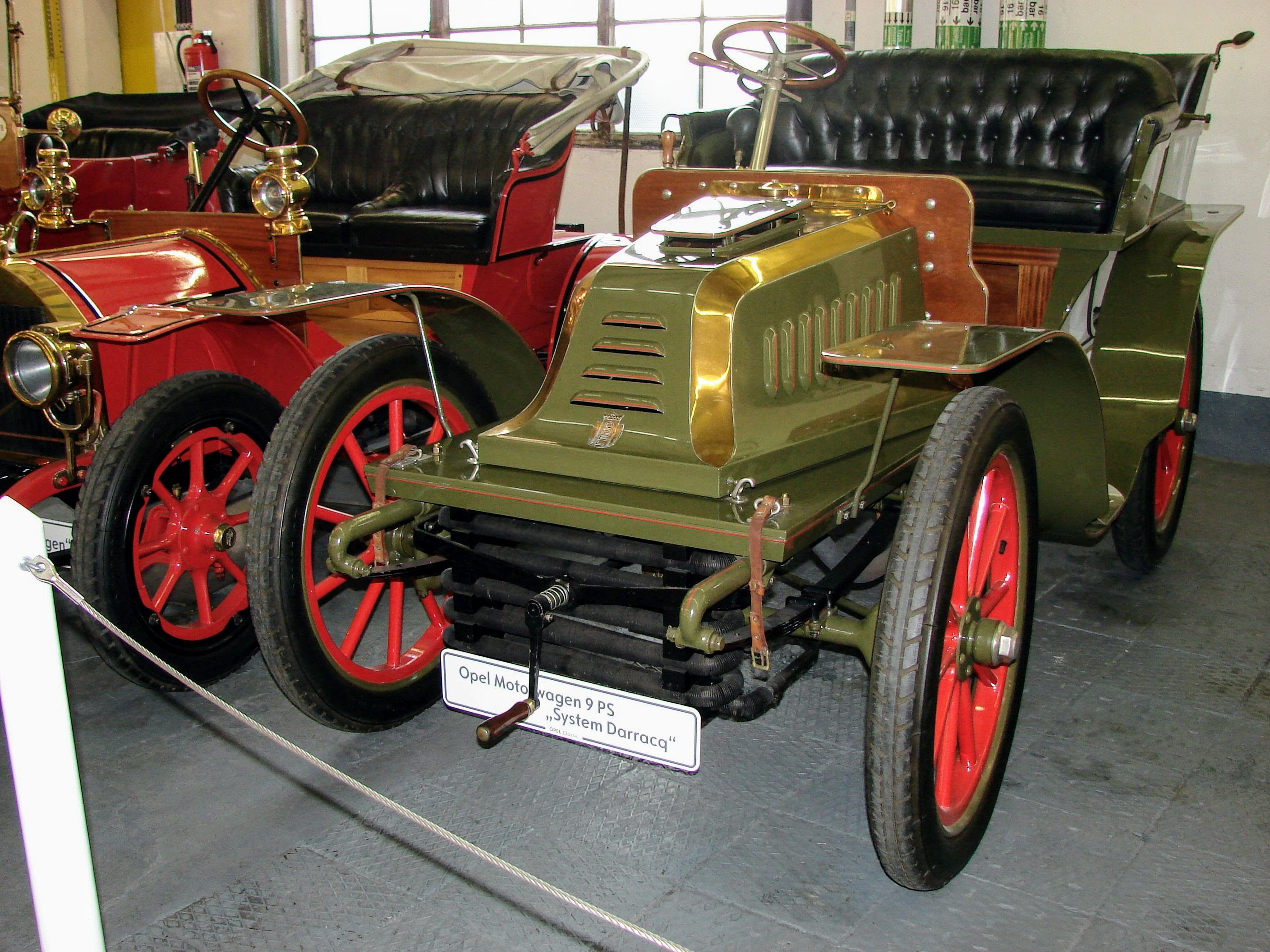 Opeli esimene koostöö prantsuse autotootjaga